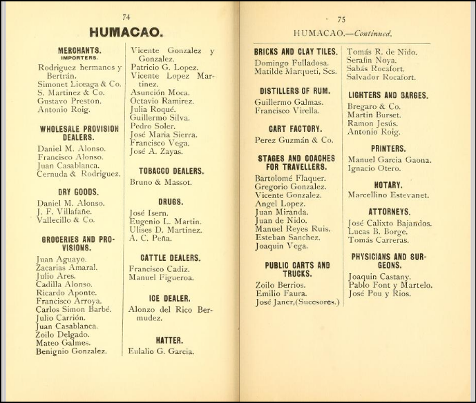 Colonial Business Directory of the Island of Puerto Rico, 1898, página 76.